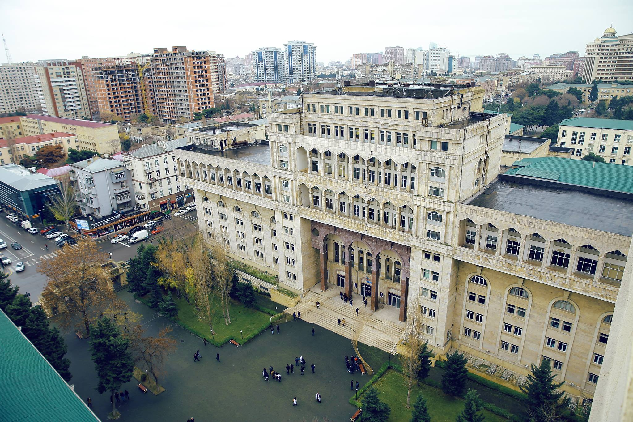 tibbuni02